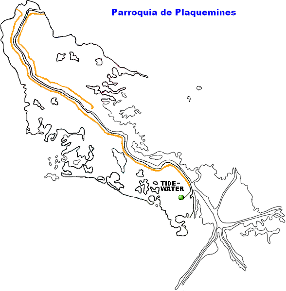 Tidewater, Louisiana